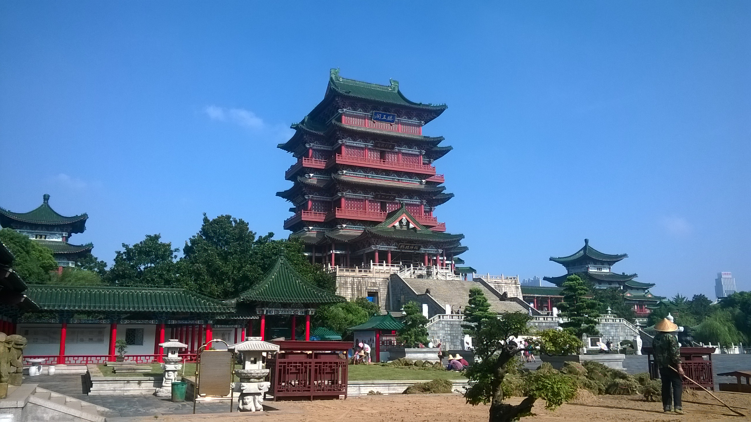 吴语: 滕王阁远眺